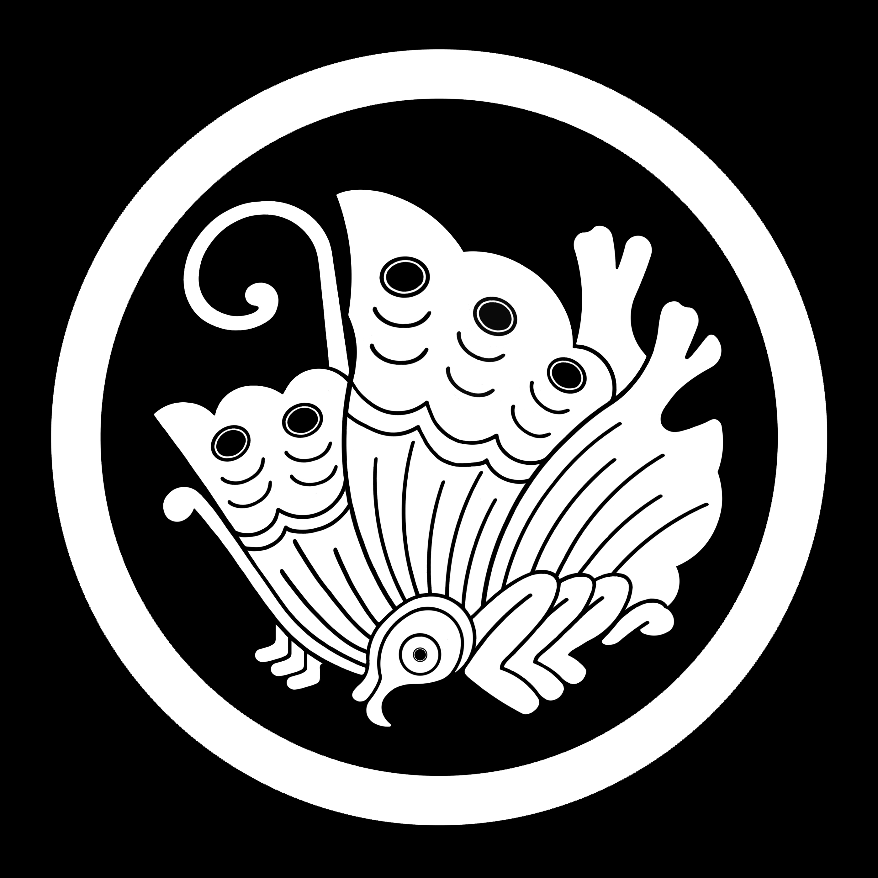 「丸に揚羽蝶」紋（染抜）